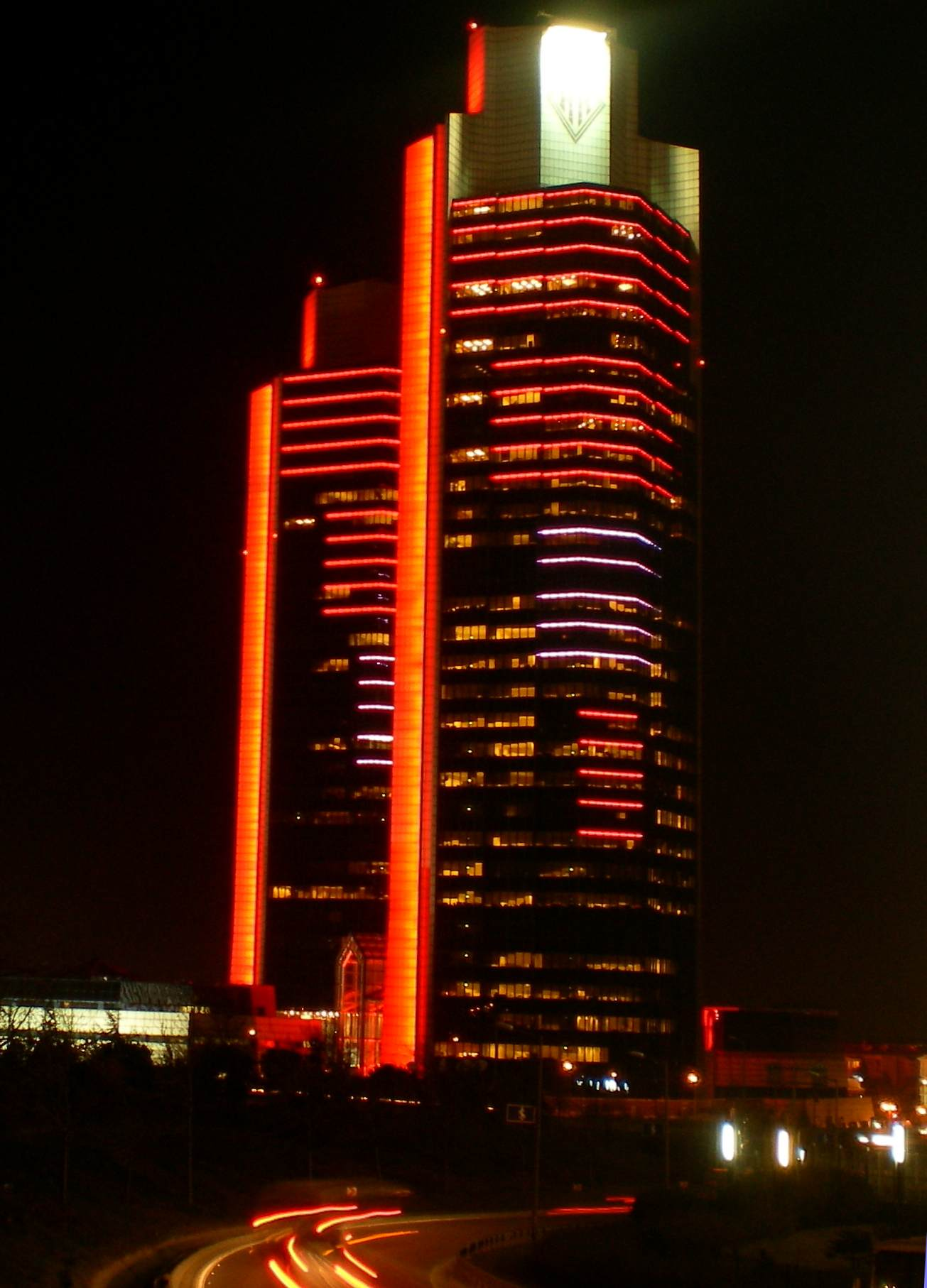 Sabancı Kuleleri gece görünümü.